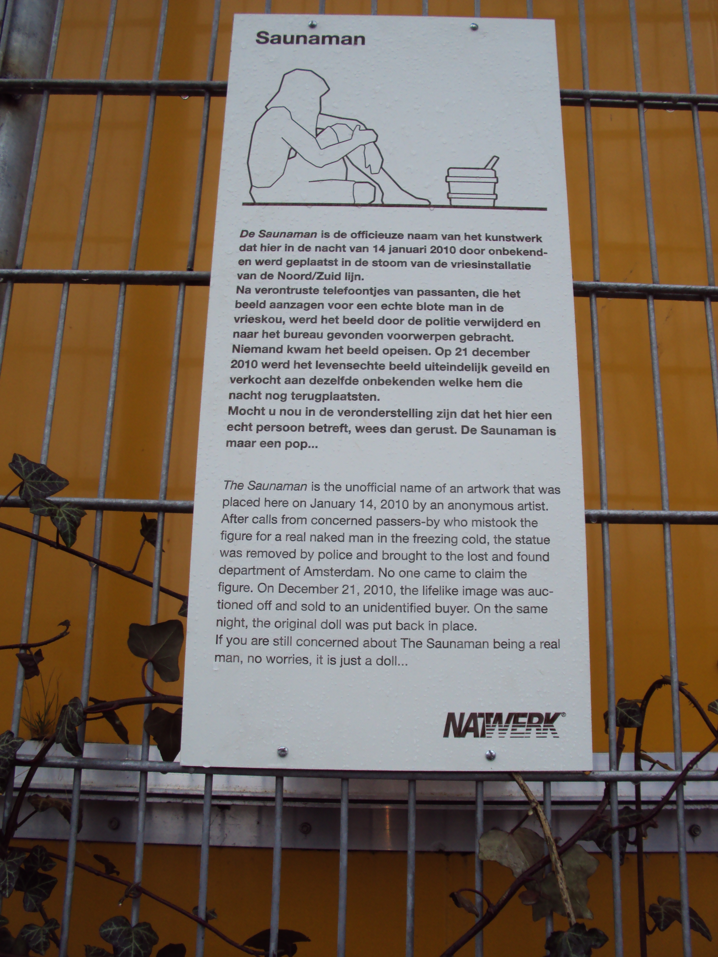 Foto van bord geplaatst bij de Saunaman.